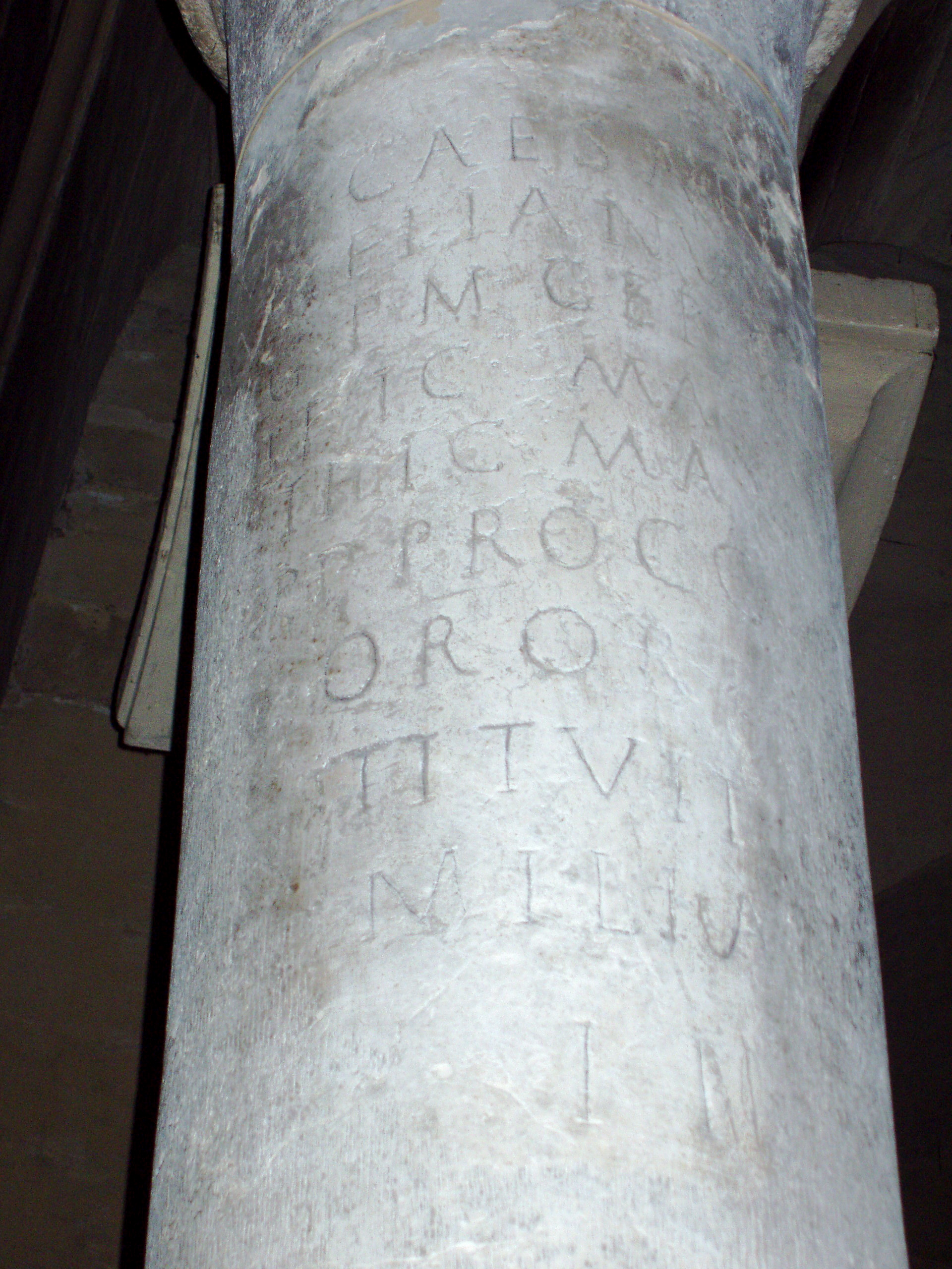 Miliario romano del emperador Aureliano reutilizado en la fábrica de la catedral de Valence (Francia), correspondiente con la inscripción CIL XVII2 160 = CIL XII 5549: Imp(erator) Caesar L(ucius) Domit[ius]/ Aurelianu[s] P(ius) F(elix) Inv[i]ct[us]/ [Au]g(ustus) p(ontifex) m(aximus) Ger[manic(us) max(imus)]/ [Go]thic(us) ma[x(imus) Carpic(us) max(imus)]/ [Par]thic(us) ma[x(imus) trib(unicia) pot(estate) VI co(n)s(ul)]/ [III] p(ater) p(atriae) proco(n)[s(ul) pacator et res/[titut]or orb[is refecit et]/ [r]estituit [---]/ milia [passuum] III